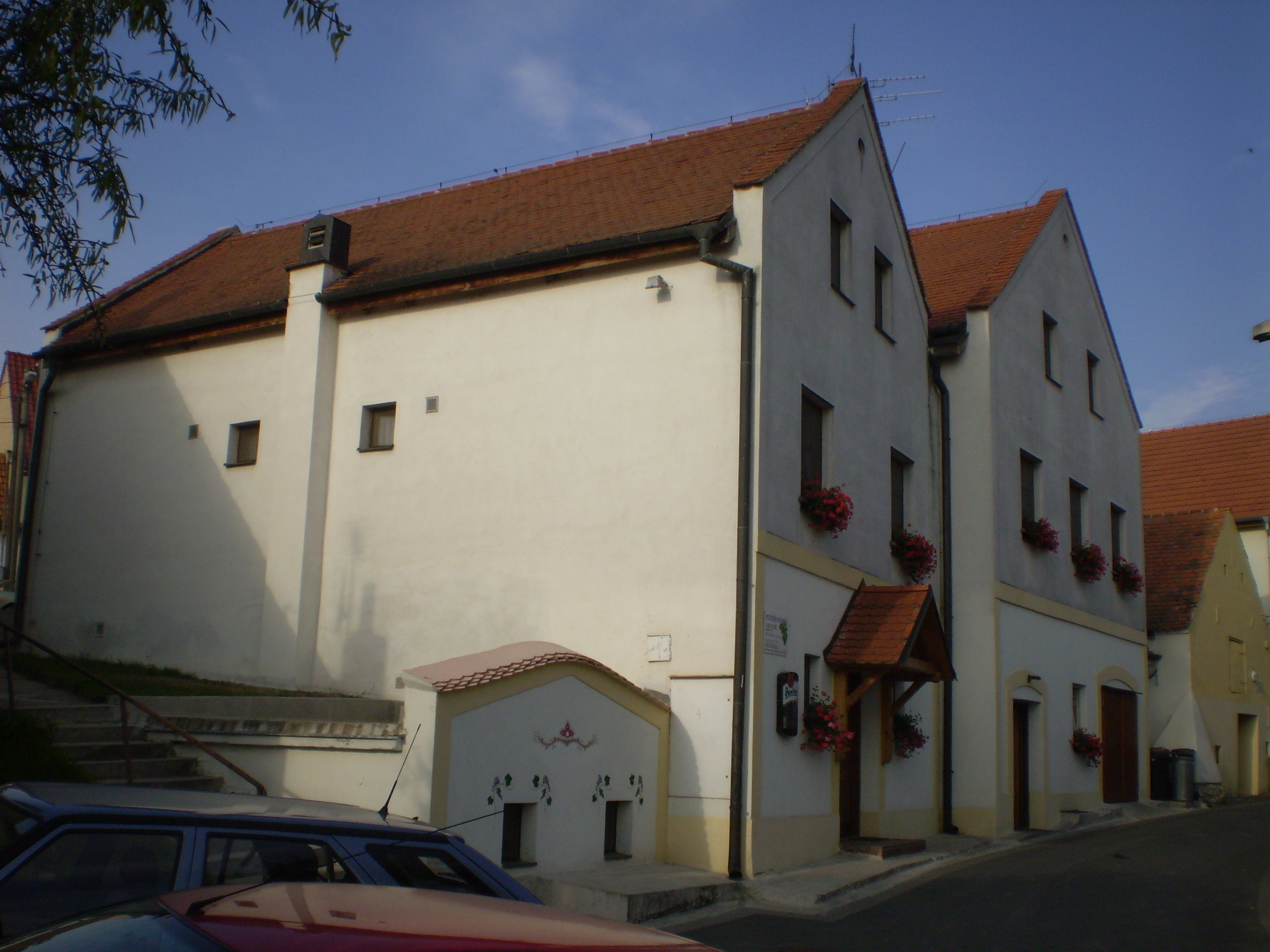 Penzion v Pavlově, okres Břeclav.